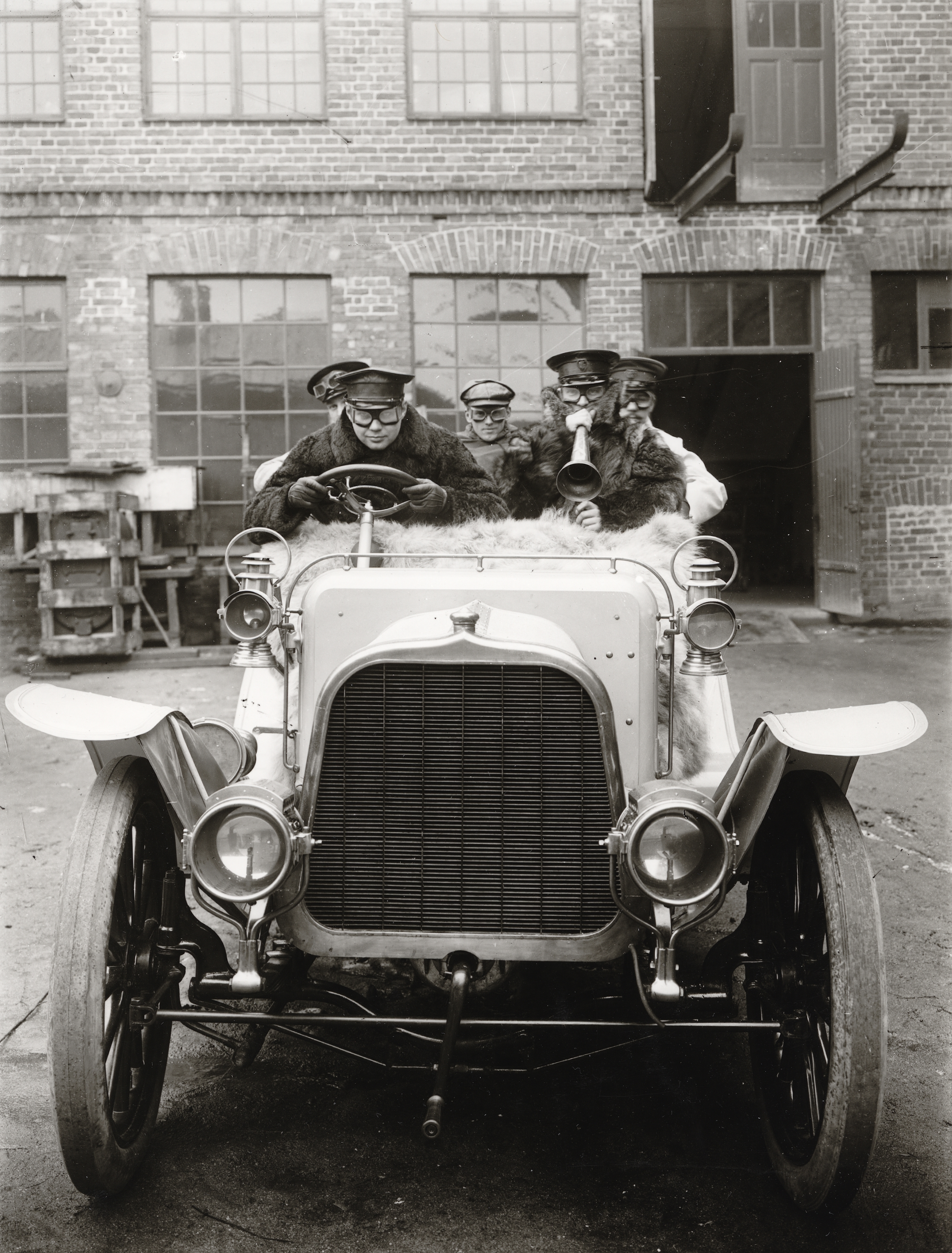 Automobil med fem passagerare utanför Gustav Ericssons Automobilfabrik. Föraren är troligen Gustaf L M Ericsson själv.